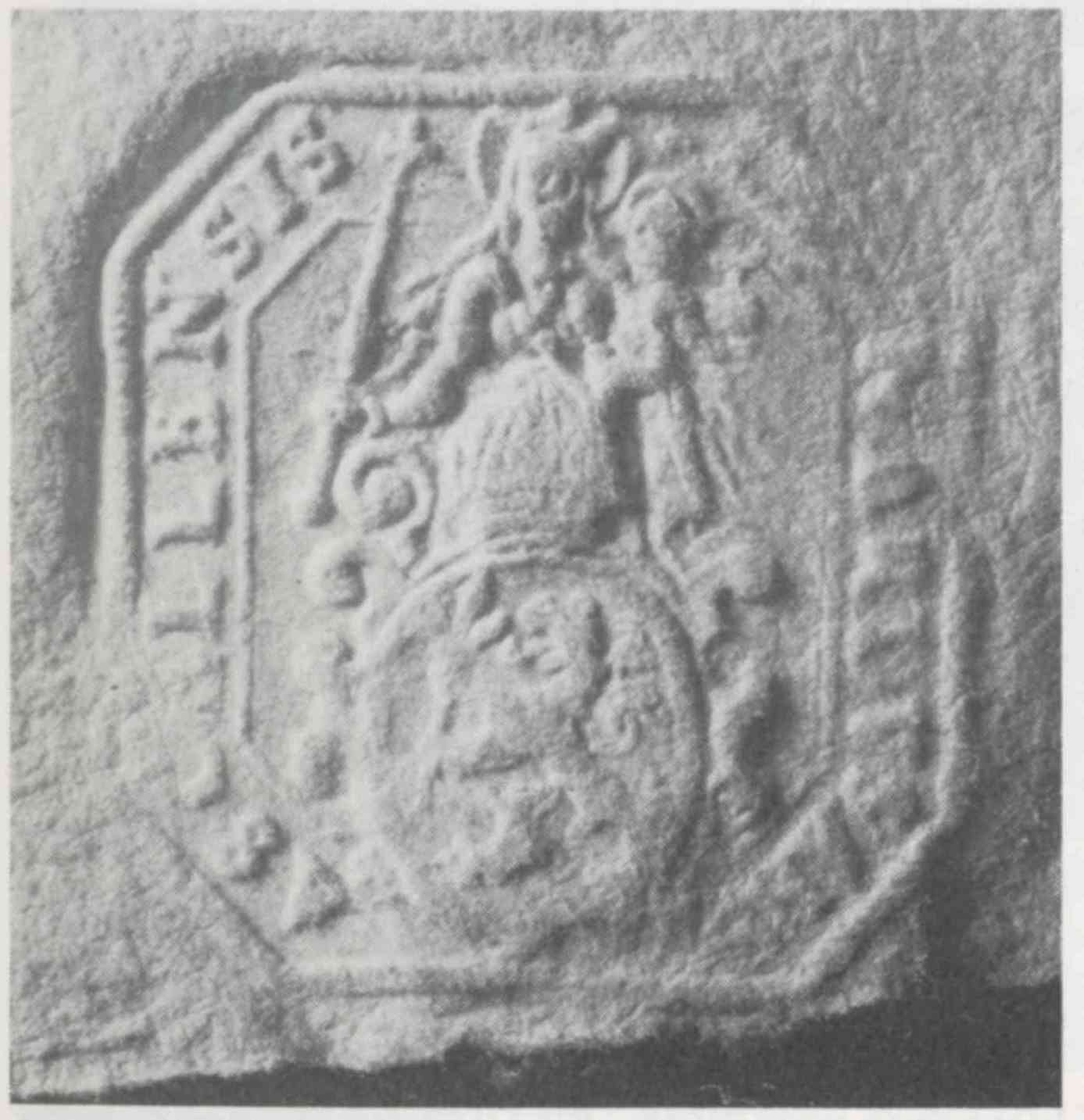 Wappen Abt Leonhard Frank (-1648), Abt von Kloster Oberzell (1614-1648)